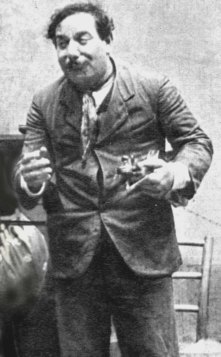 L'attore siciliano Giovanni Grasso sr in Sperduti nel buio (Martoglio, 1914)